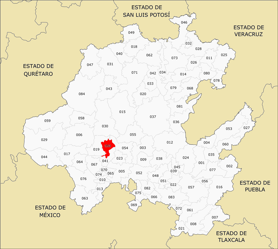 Municipio de Hidalgo